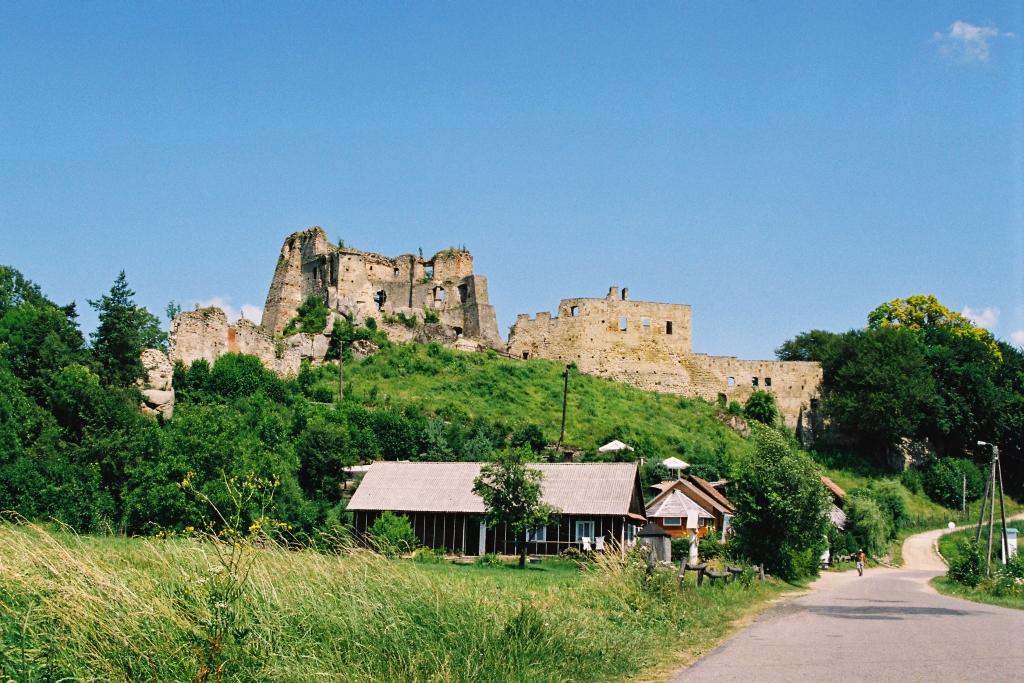 Castle Kamieniec in Odrzykoń situated nearby Krosno City